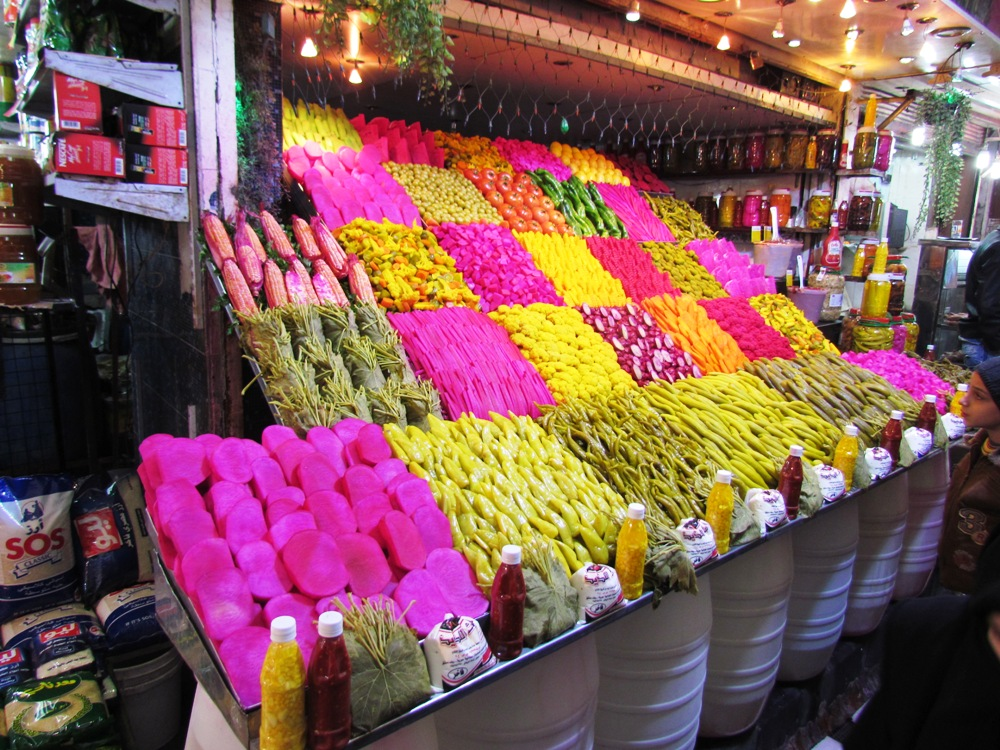 لوحة فسيفسائية لمحل مخللات بسوق ساروجة دمشق سوريا